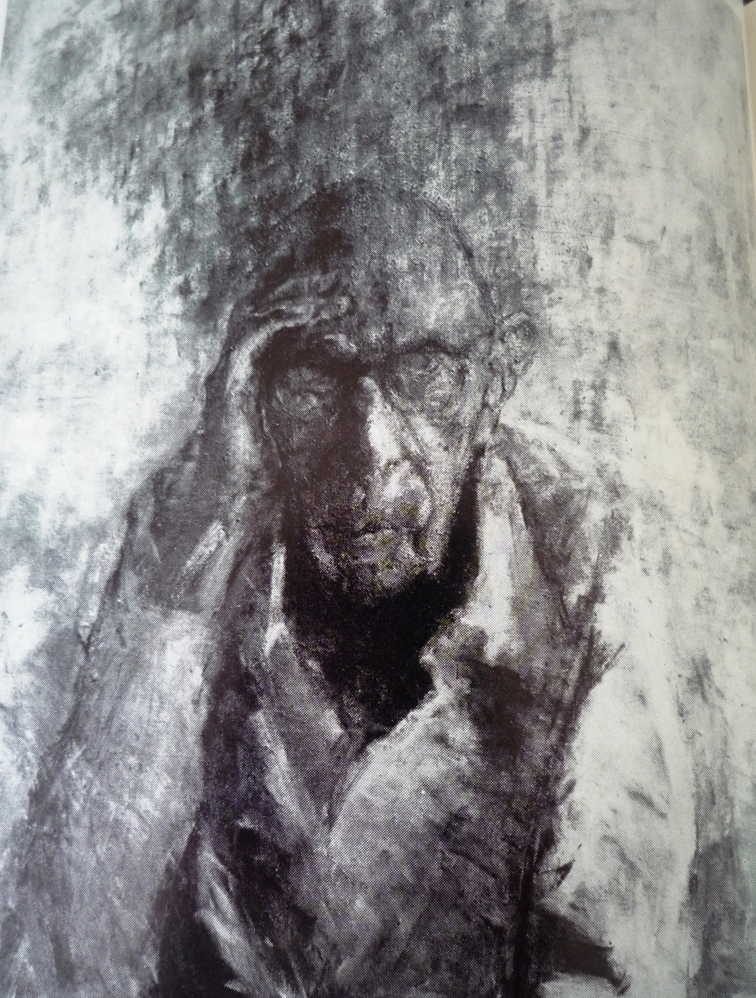 Vladimír Suchý obraz 3